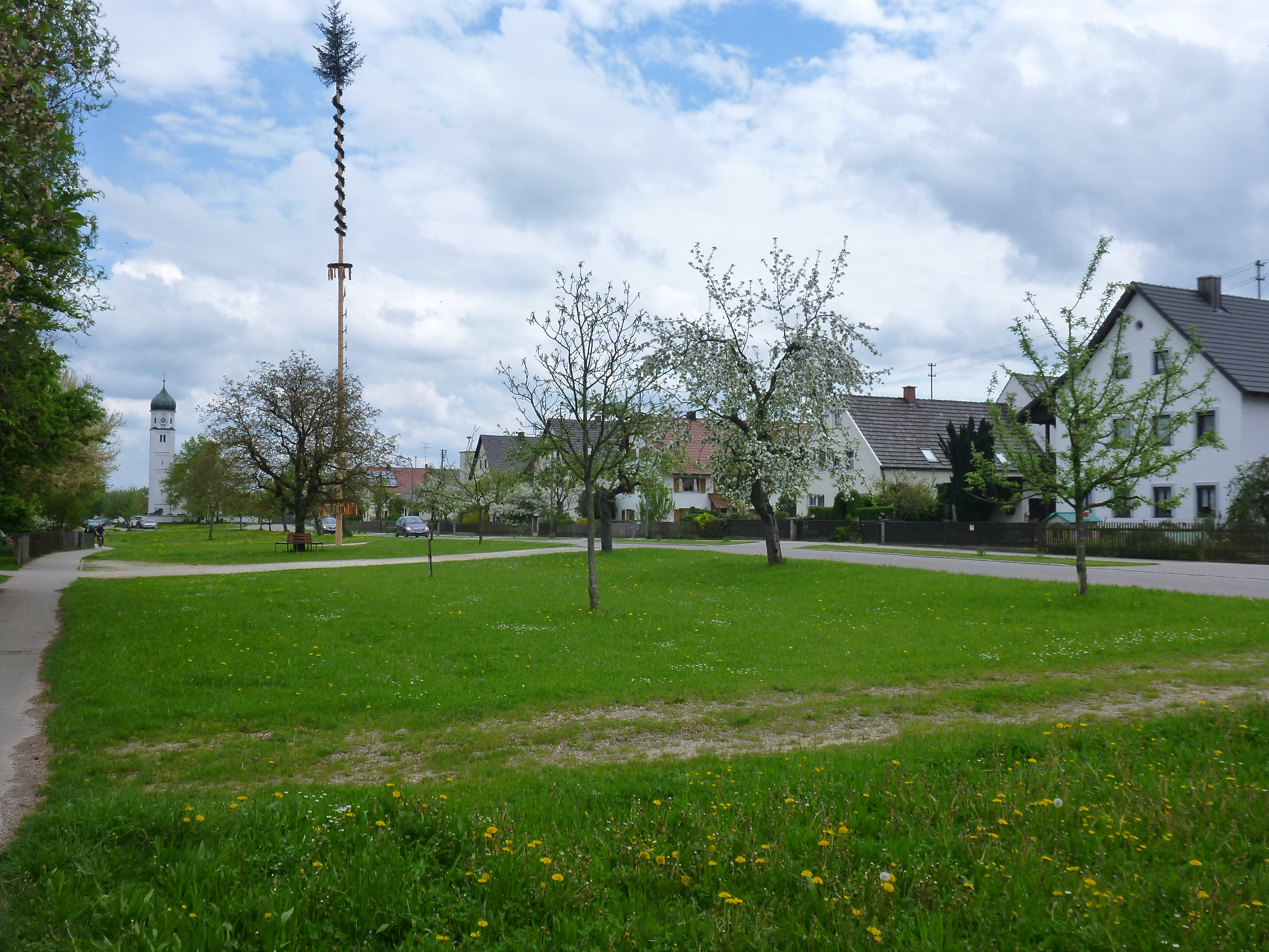 Anger Baiershofen, Bäume blühend, mit Kirche im Hintergrund